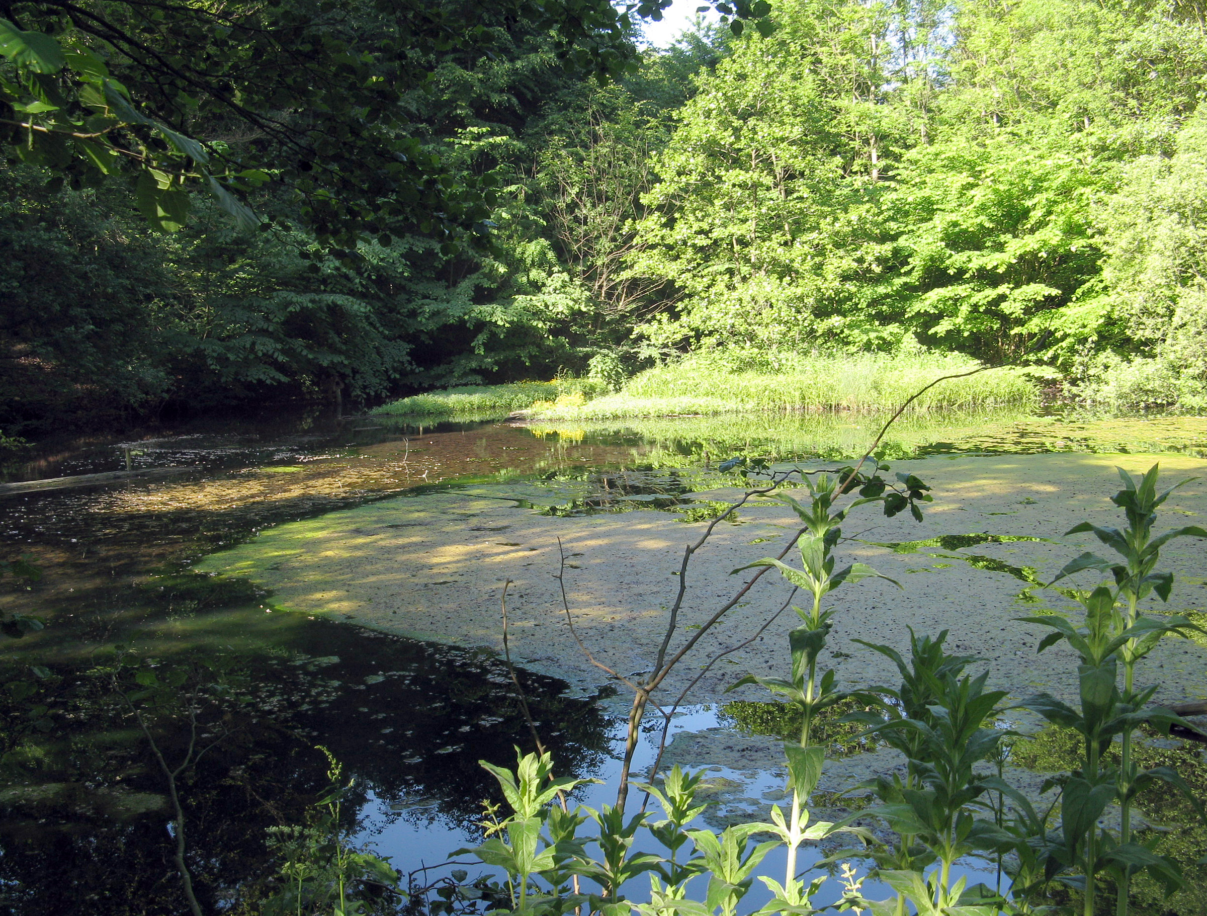 Mølledammen ved vandmøllen Silistria i Marselisborgskoven ved Aarhus